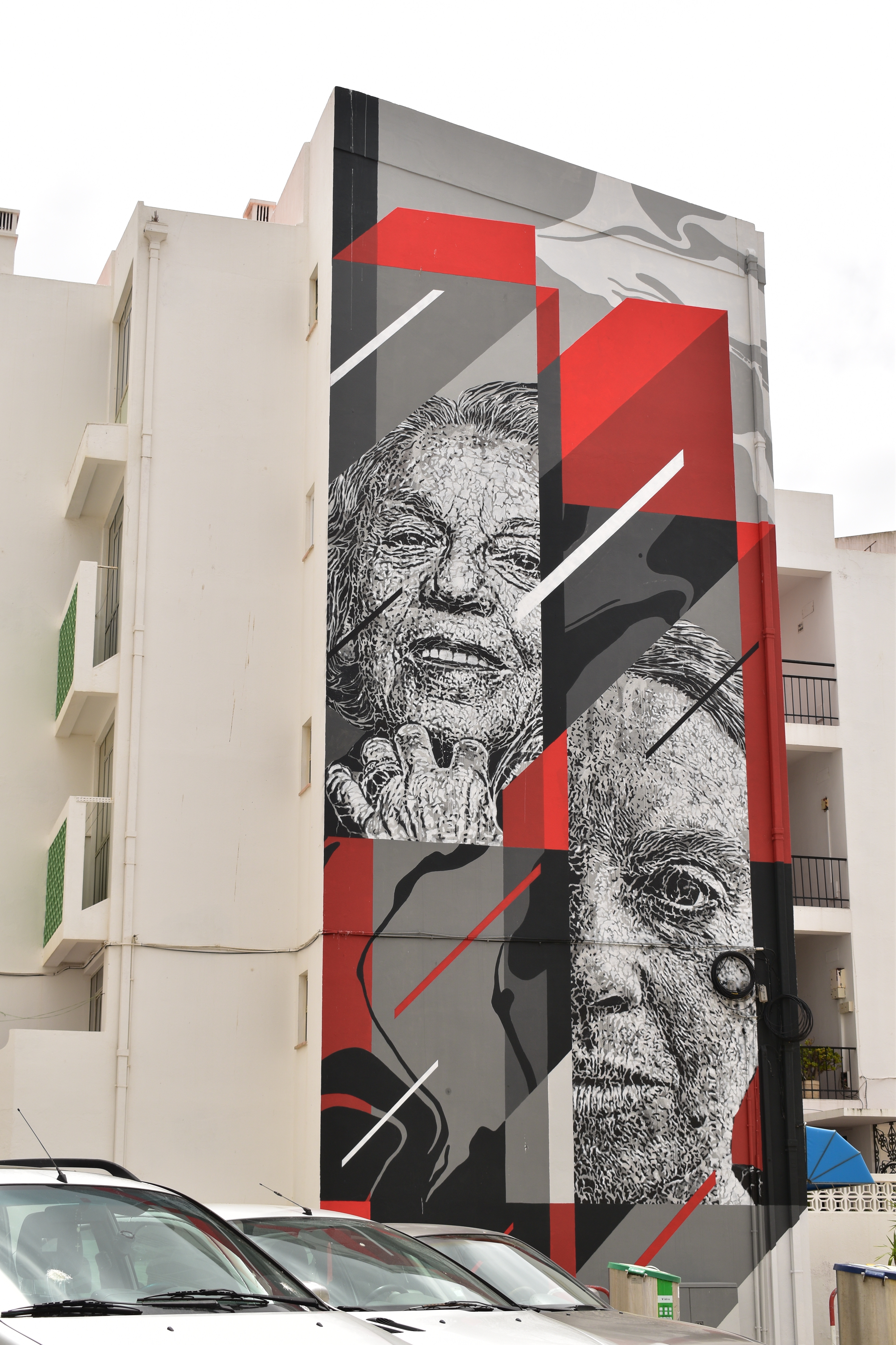 Mural de Sophia de Mello Breyner Andresen na cidade de Lagos, Algarve - Portugal.